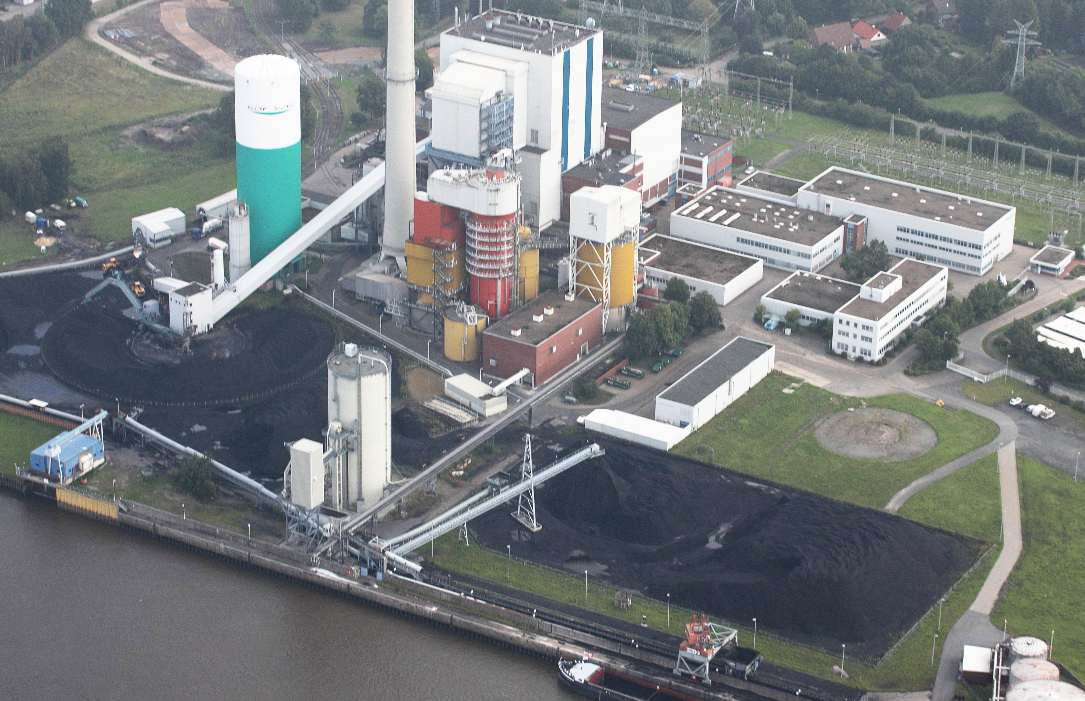 Fotoflug Bremen; Flughöhe 500 m; Luftbilder Bremen-Nord: vom U-Boot Bunker Valentin bis Vegesack ; Flug entlang der Weser von West nach Ost, über dem linken Weserufer, mit Blickrichtung zum rechten Weserufer